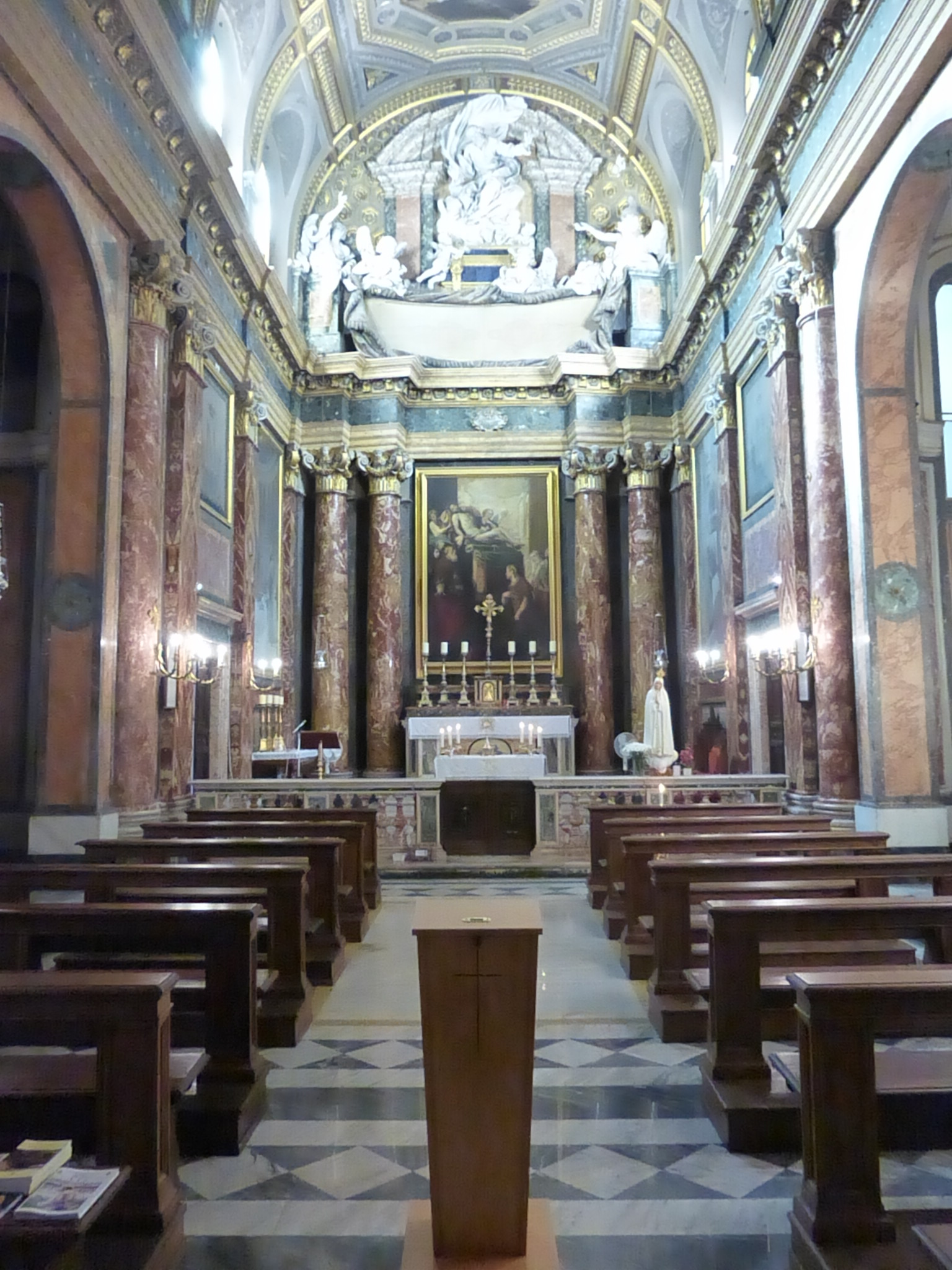 Roma, Chiesa del Santissimo Sudario dei Piemontesi, interno